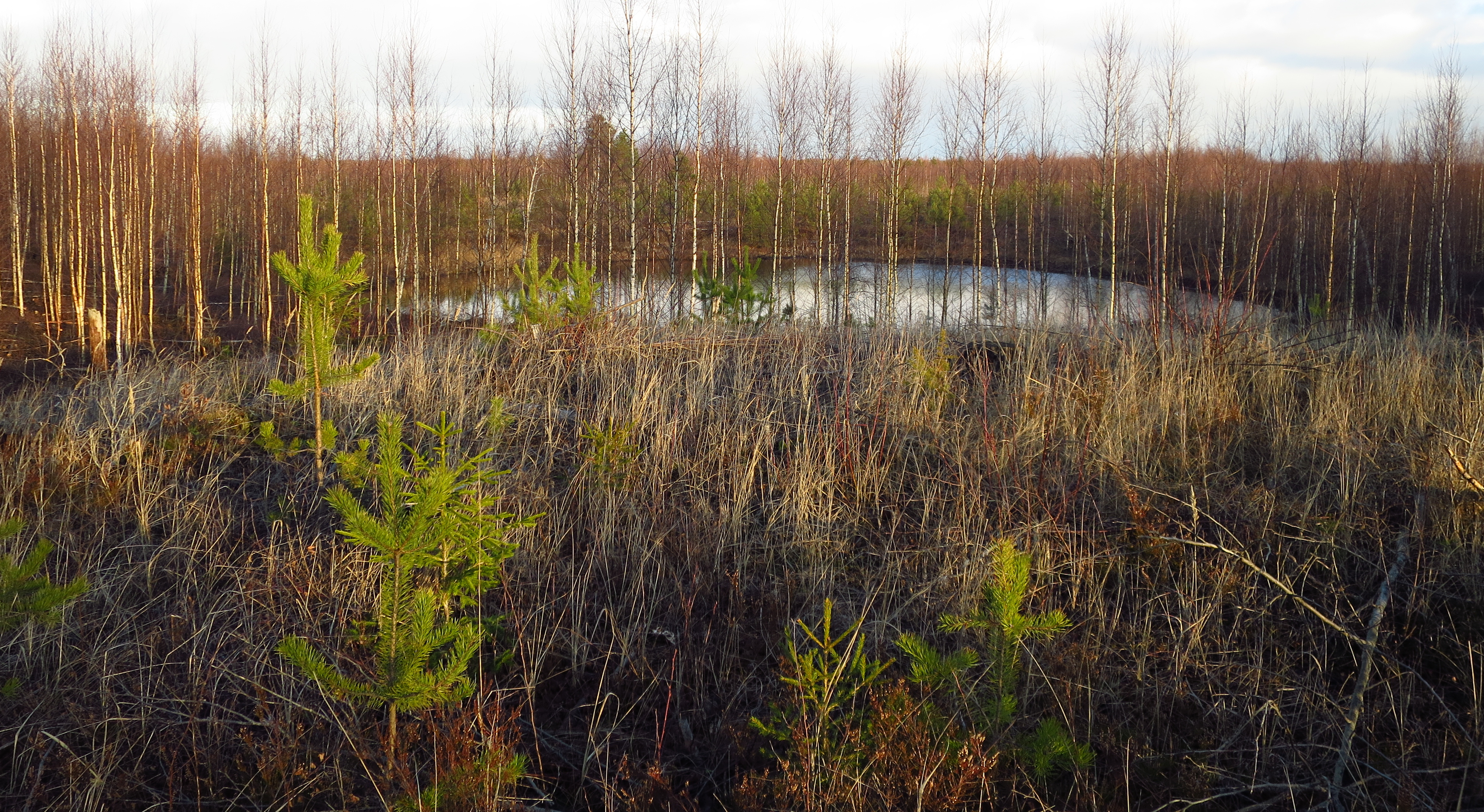 Kurtna Lusikajärv